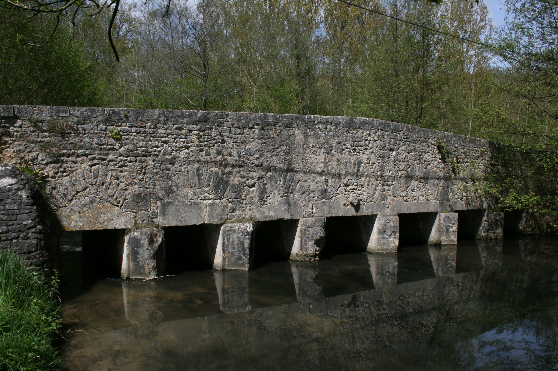 Pont du Gril de Corbelin – Commune de Griselles – Département du Loiret – France – Pont de la fin du XIIème - début du XIIIème siècle